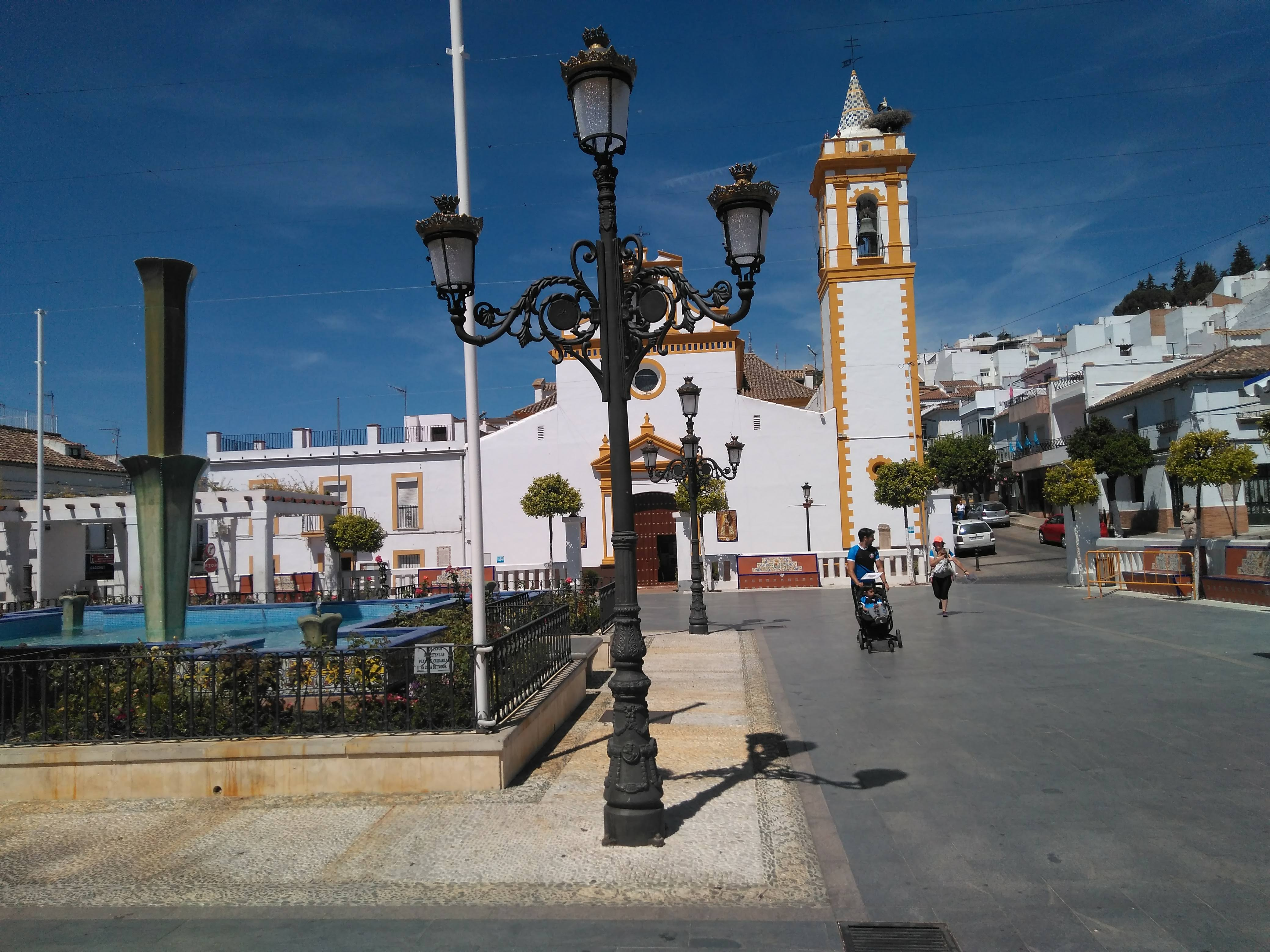 Parroquia Nuestra Señora del Carmen de Prado del Rey (Andalucía, España)